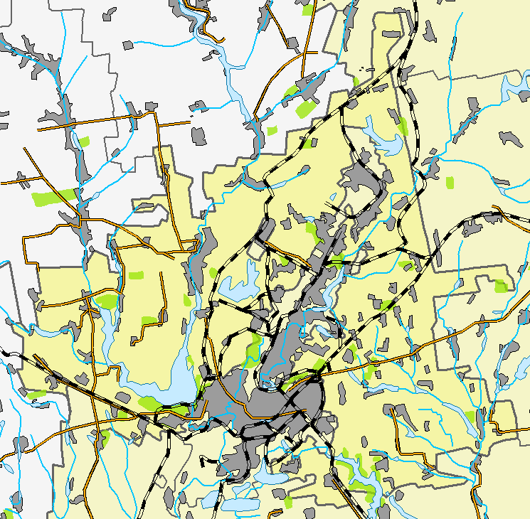 Криворізький район Дніпропетровської області України